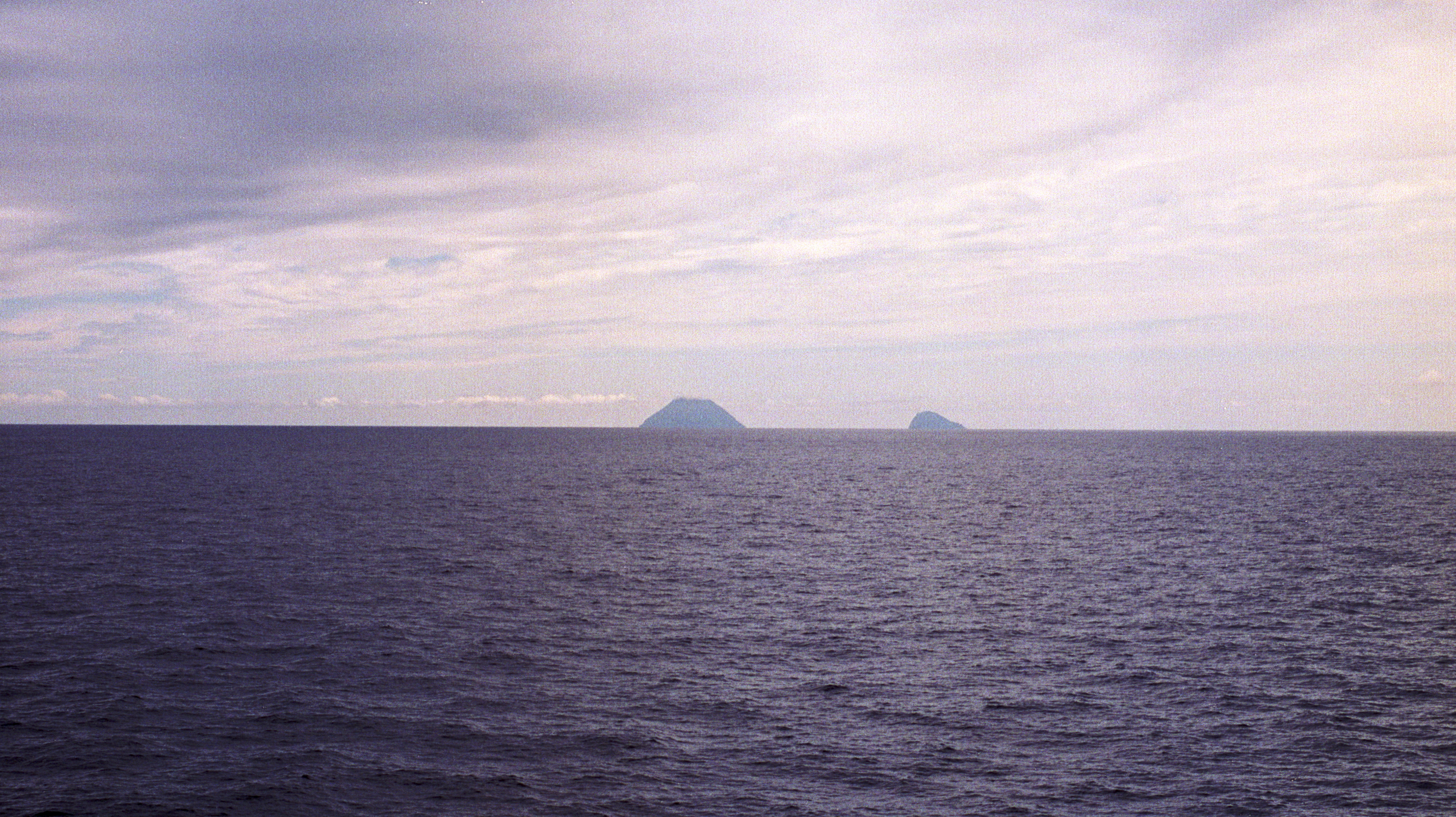 トカラ列島の横当島と上ノ根島。フェリーとしまより撮影。